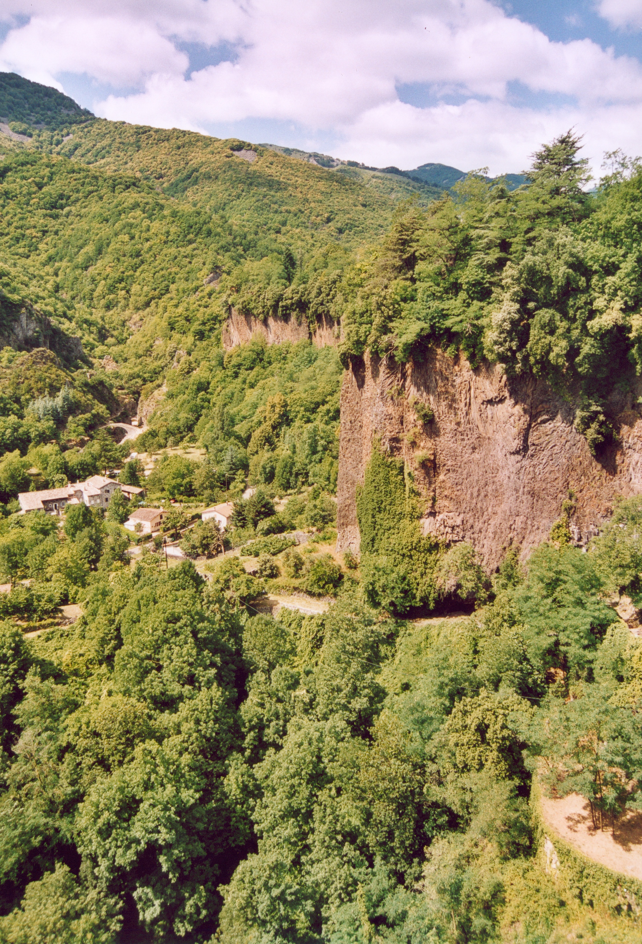 France Ardèche Thueyts Photographie prise par GIRAUD Patrick